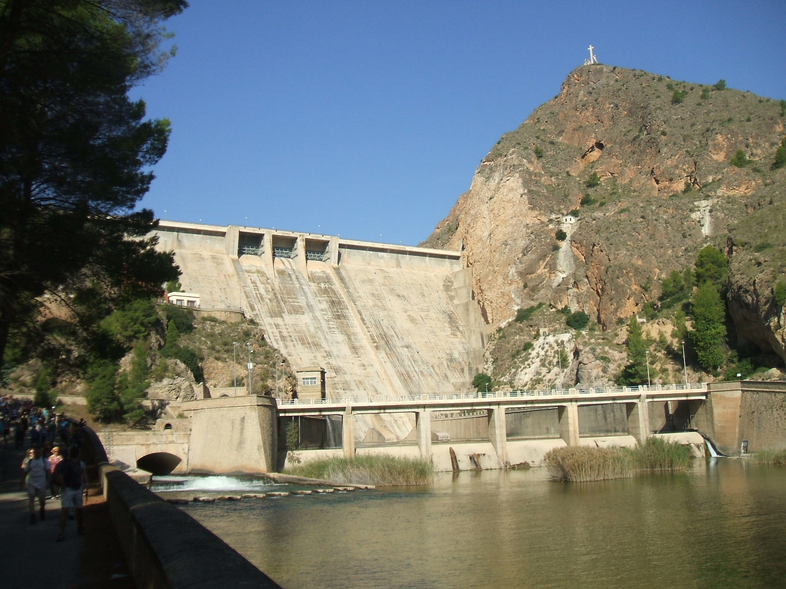 Presa del embalse del Cenajo, río Segura, España.